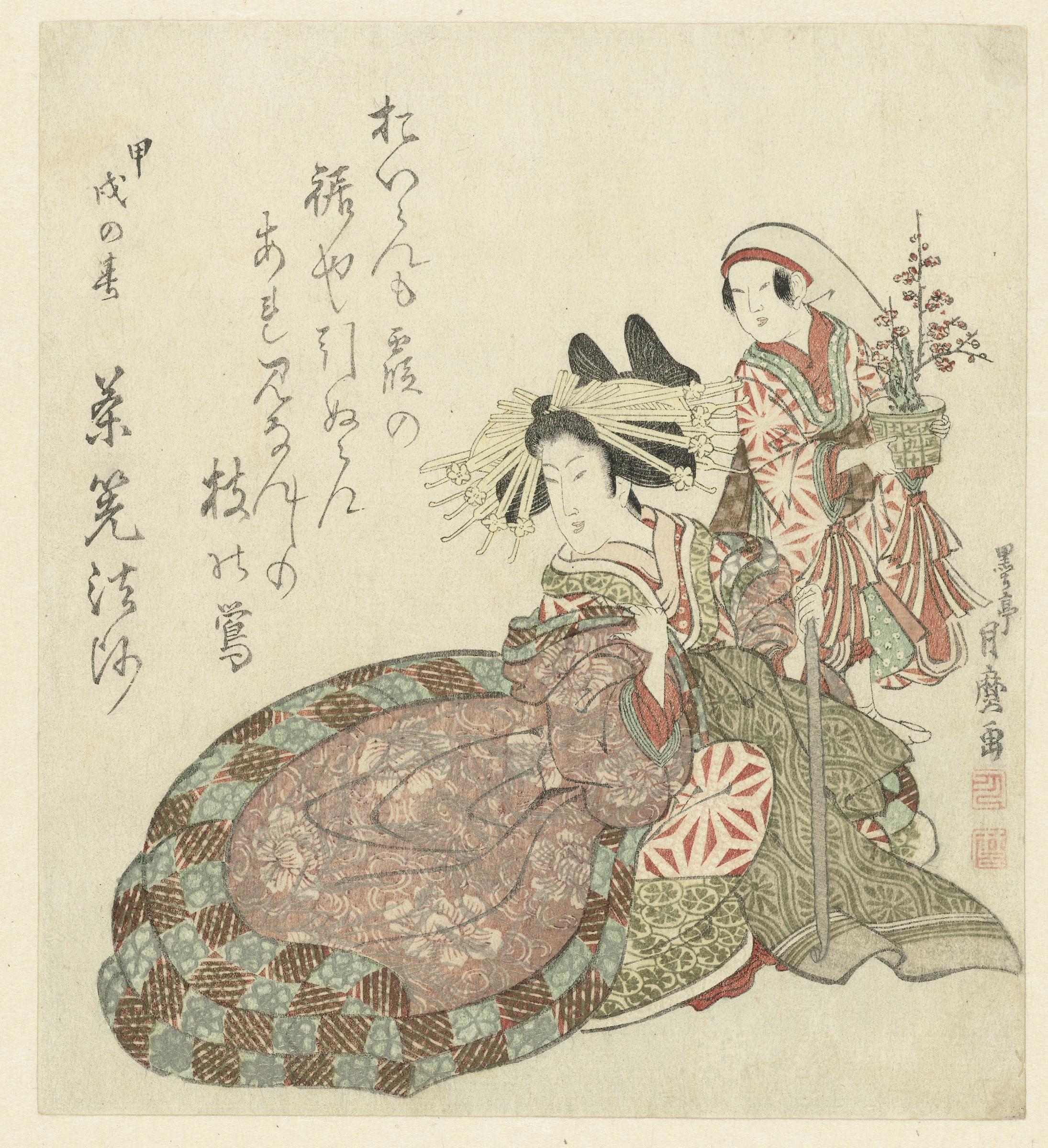 Een zittende courtisane in fraai gewaad met achter haar een staande bediende met een pot met pruimenbloesem in de hand. Met één gedicht. Label Line: Kitagawa Tsukimaro (.... - 1830), 1814, kleurenhoutsnede; blinddruk; lijnblok in zwart met kleurblokken; metaalpigmenten Collection: prenten; Japan (collectie)